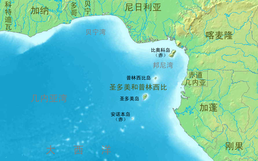 描述摘要 }